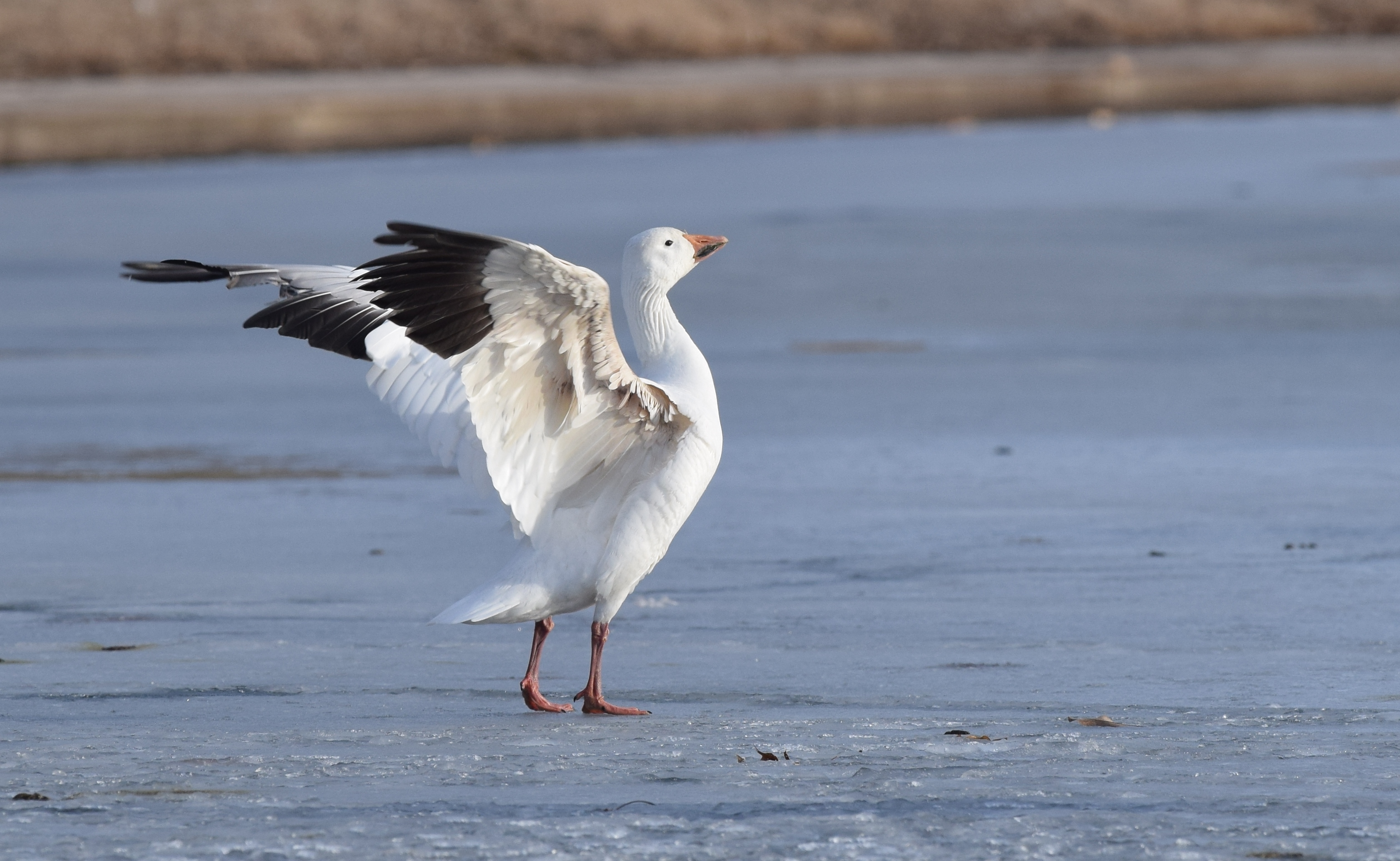 Carondelet Park 1/24/16